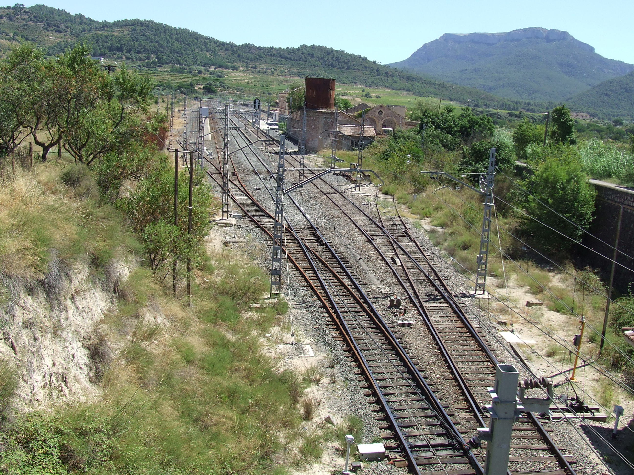 Estació de ferrocarril de Marçà, oficialment de Falset-Marçà.